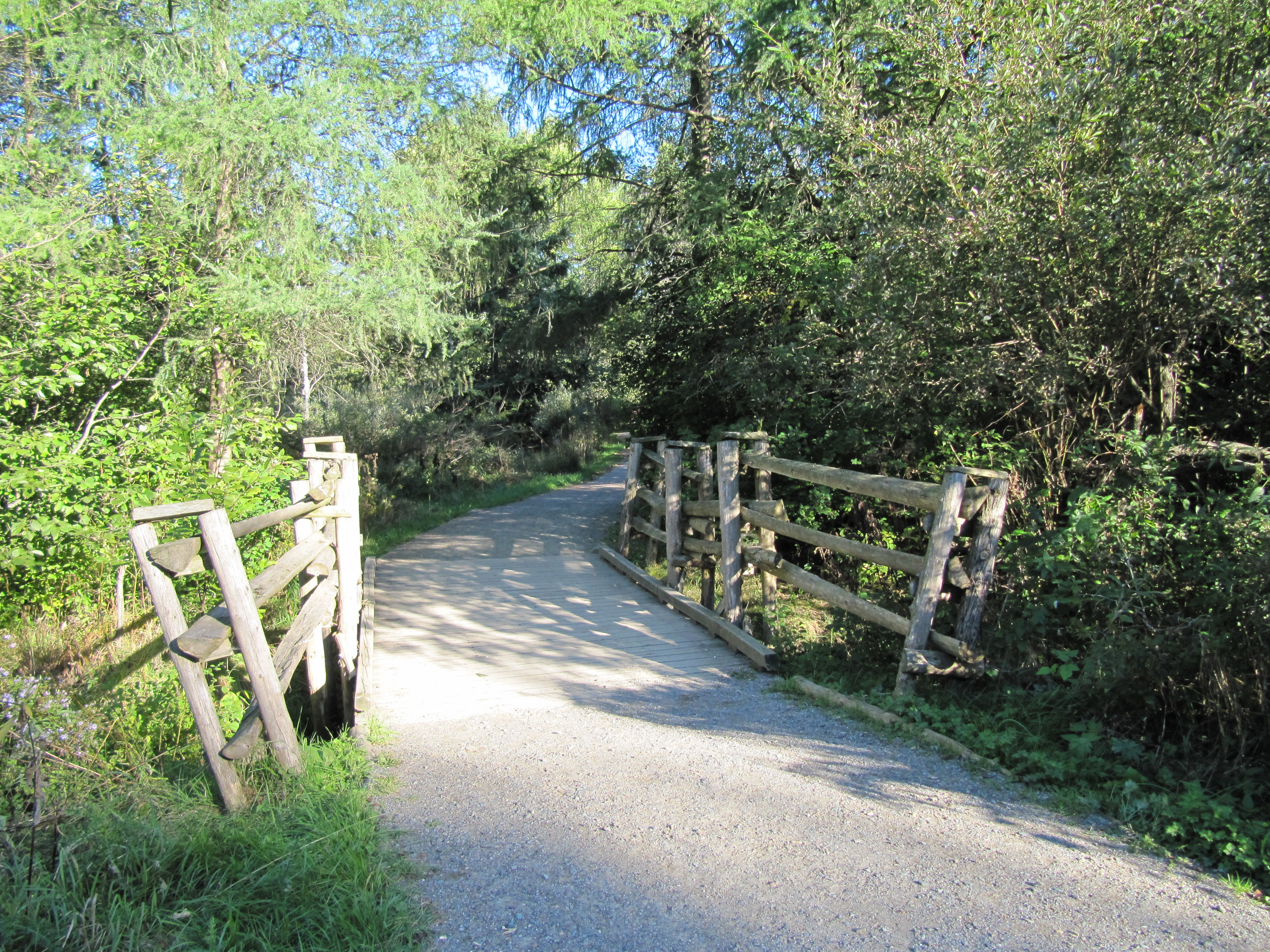 Photo prise au Centre d'Interprétation de la nature du lac Boivin de Granby (Québec). Petit pont .